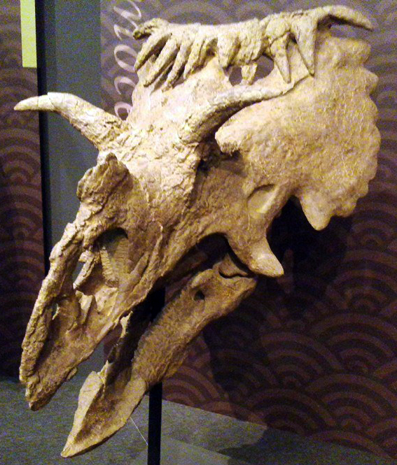 kosmoceratops richardsoni の頭骨